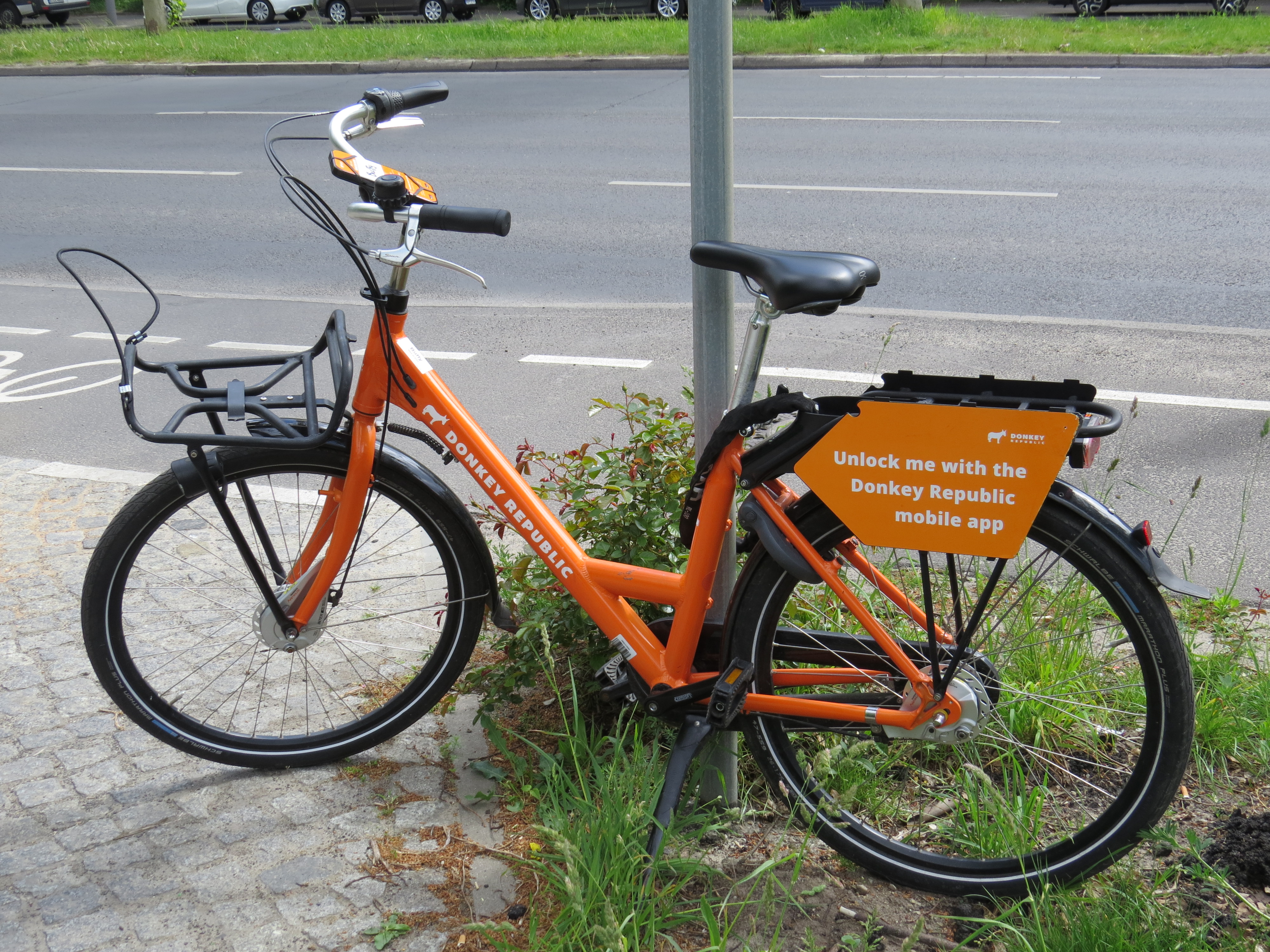 Landsberger Alle, Leihfahrrad Donkey Republic